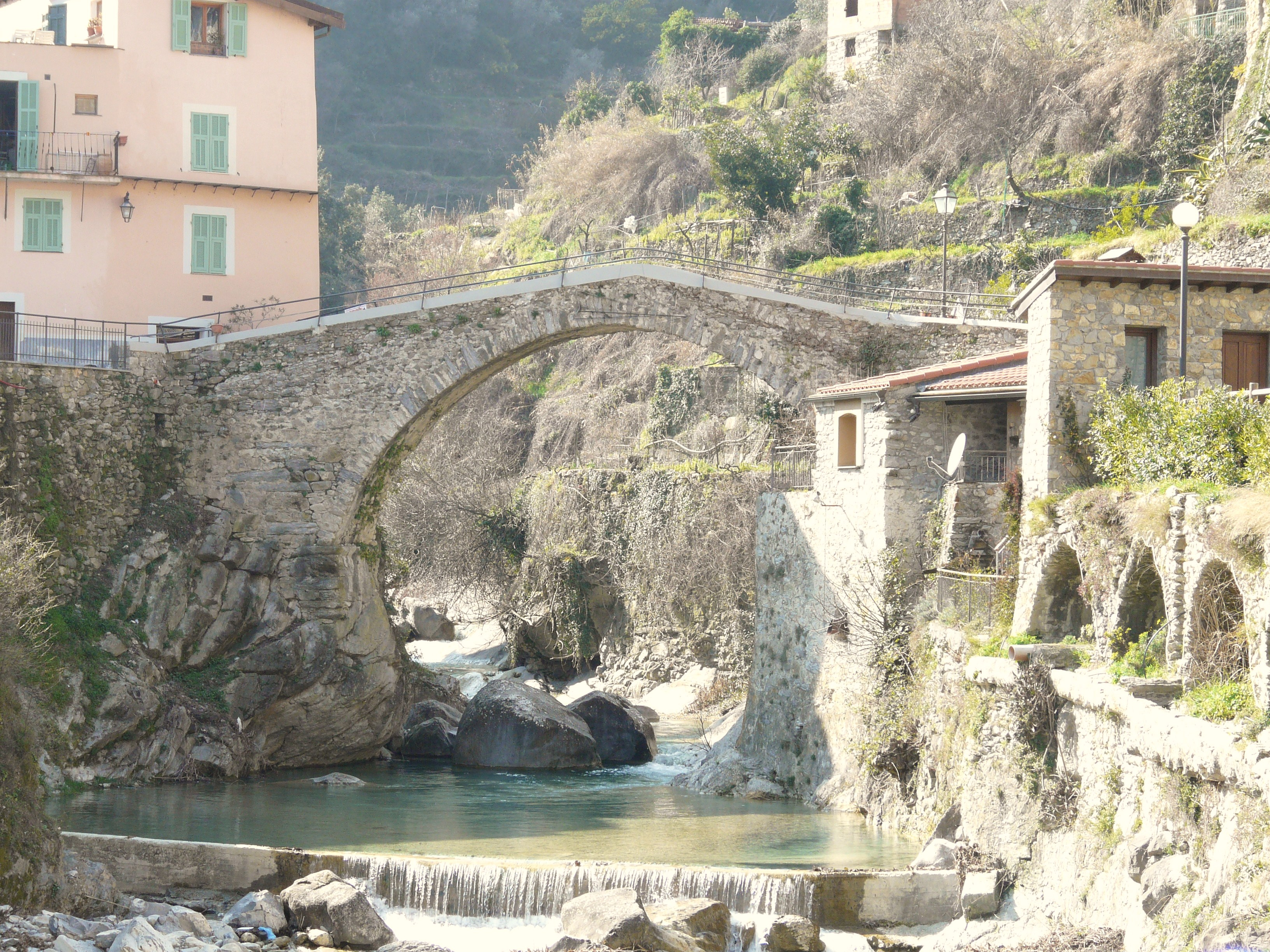 Rocchetta Nervina, Liguria, Italia